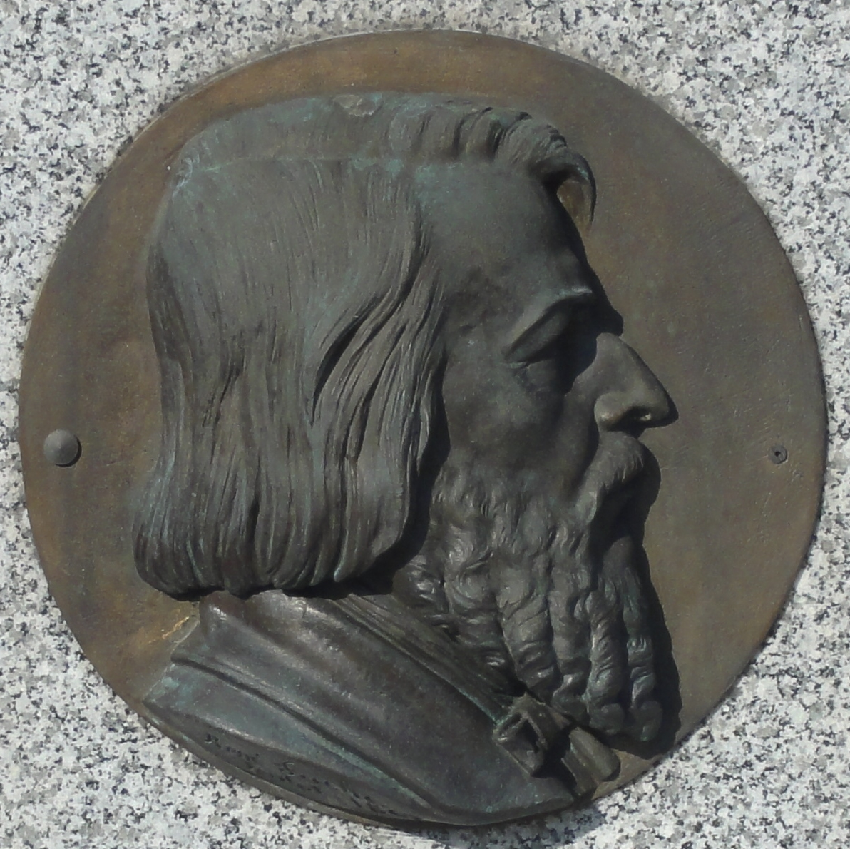 Cimetière de Douai, Douai, Nord, Nord-Pas-de-Calais-Picardie, France. Tombe de Théophile Bra, médaillon réalisé par René Fache.